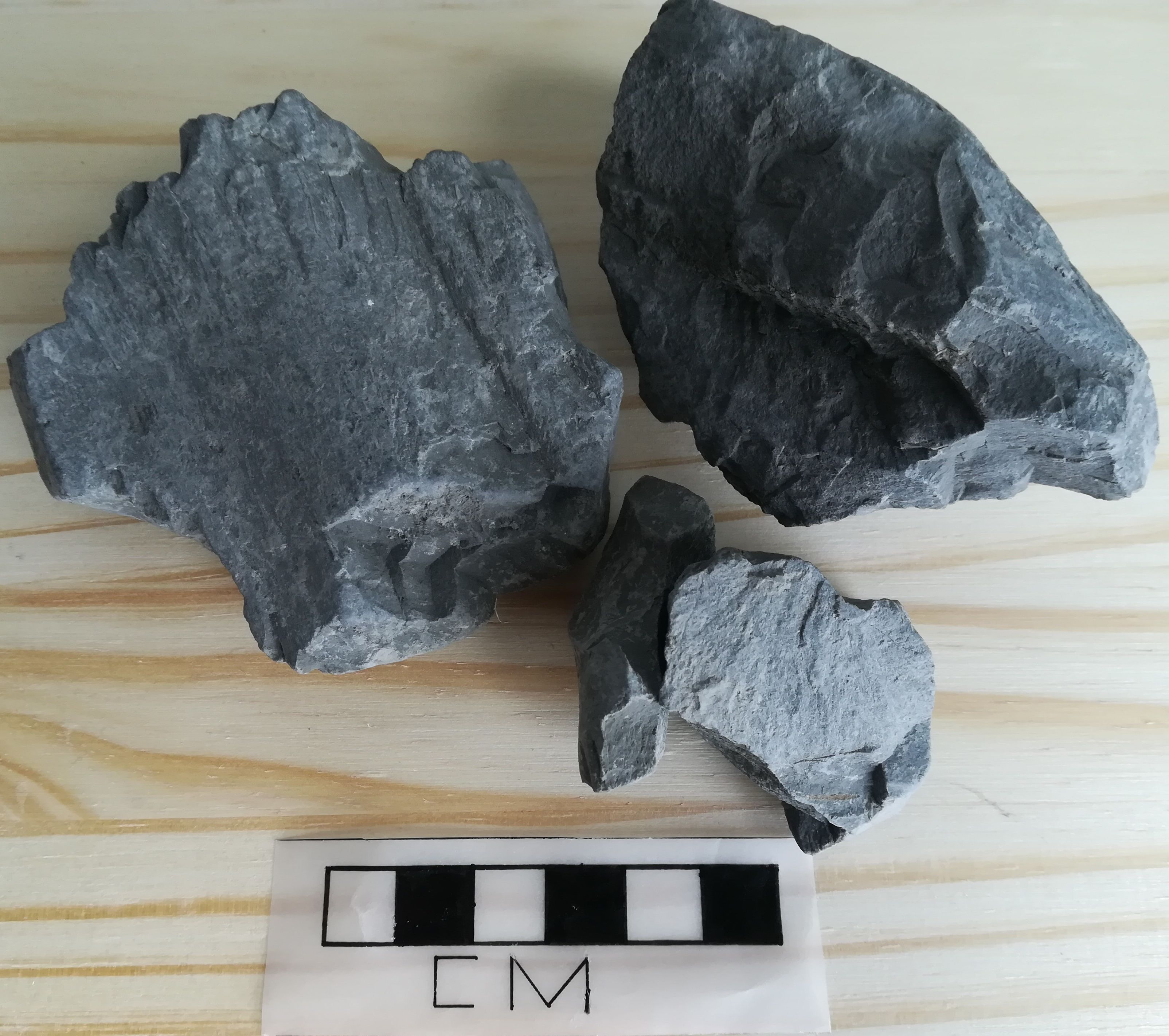 Argilite du Callovo-Oxfordien, forages de l'Andra à Bure, 160 Ma, 490m de profondeur. Collection personnelle.